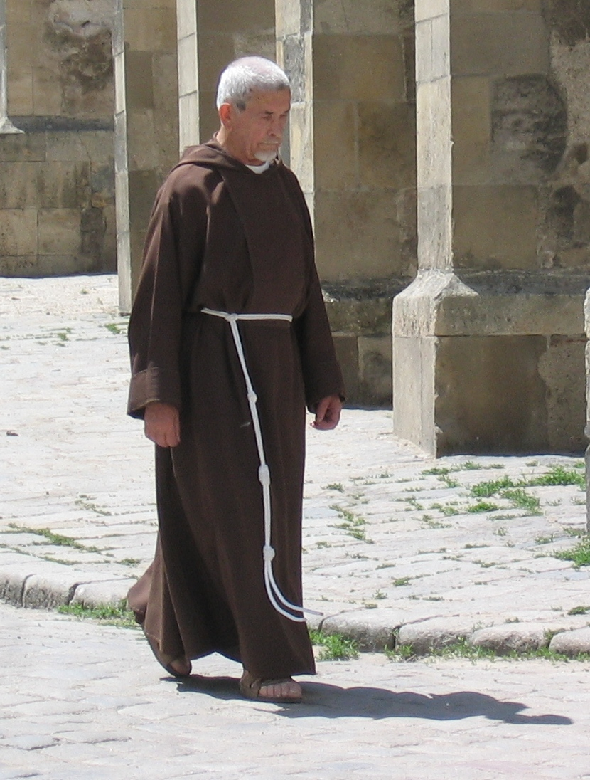 Monk, Bratislava